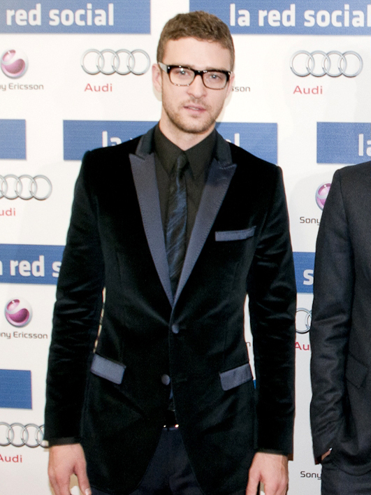 El cantante y actor Justin Timberlake en el estreno de la película La red social (The social network) en Madrid, España, el 6 de octubre de 2010.